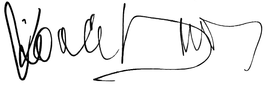 Koncz Zsuzsa – autograph